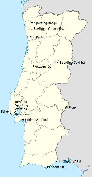 Carte des clubs participants du championnat du portugal de football de première division 1949-1950